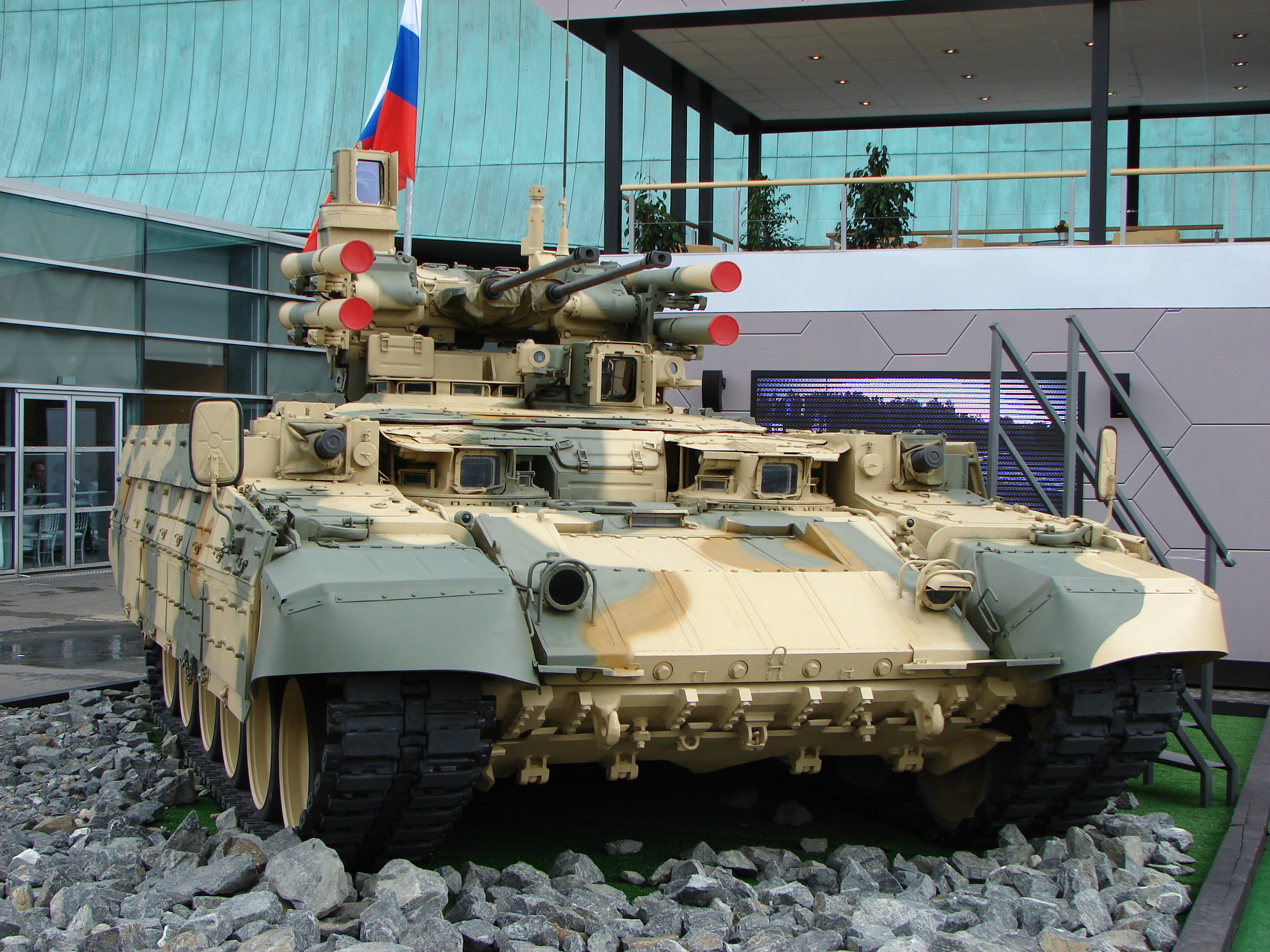 Un tank vu de face à Eurosatory 2012